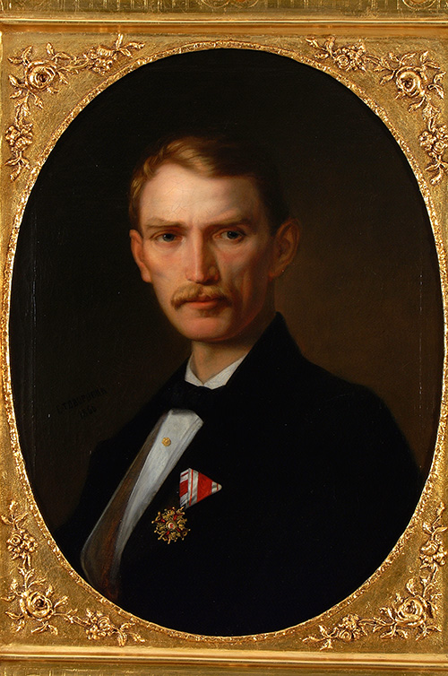 Potred Milana Đ. Milićevića slikara Steve Todorovića, 1866. Narodni Muzej u Beogradu.